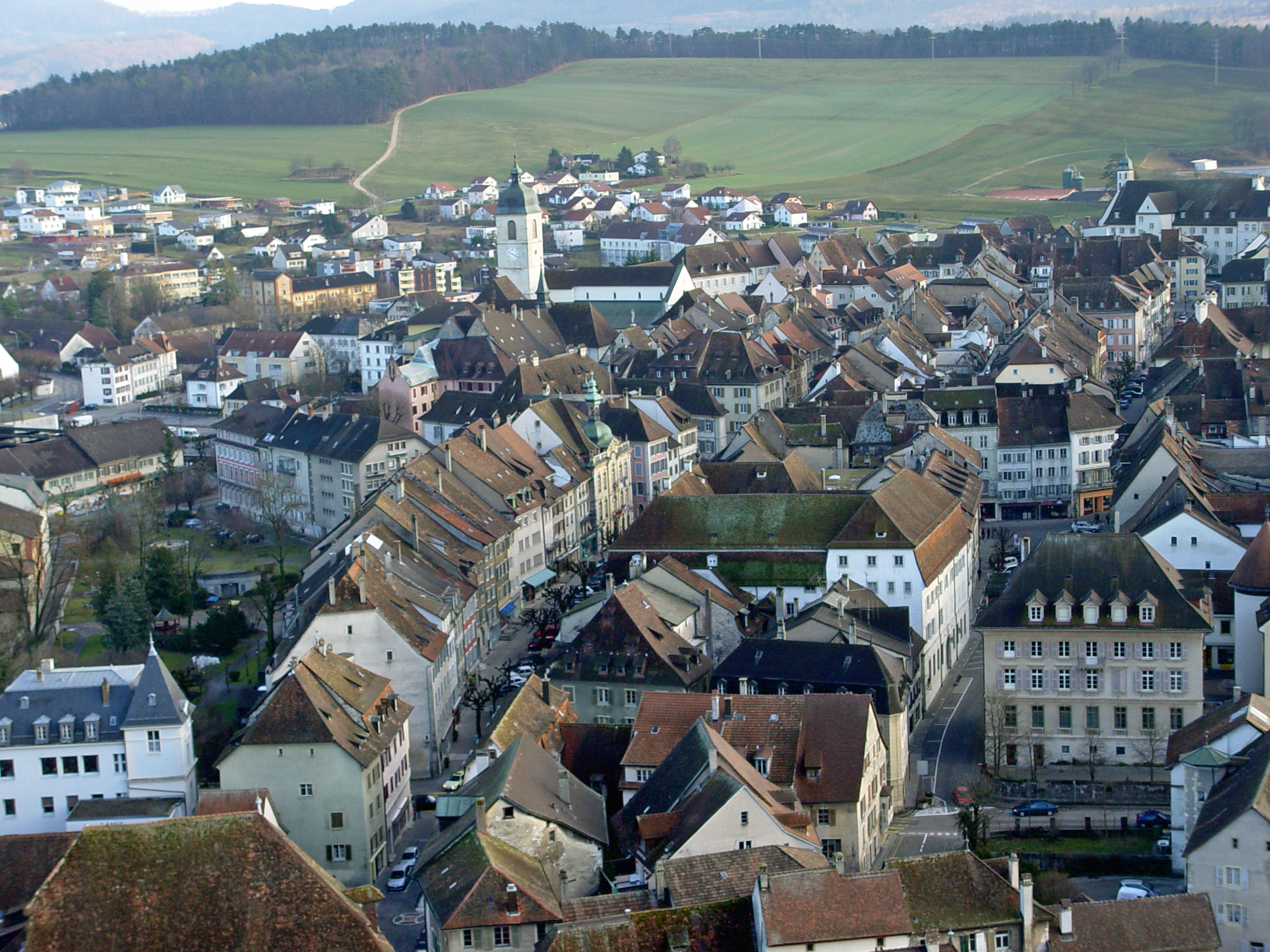 Porrentruy von oben fotografiert